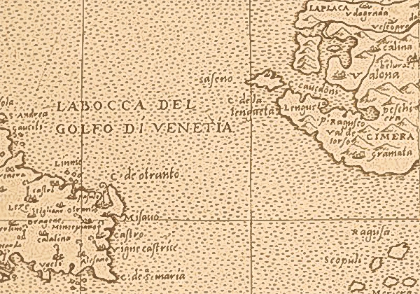 Vergrößert und geschärft von -- AM 18:26, 15. Aug 2006 (CEST) Die Straße von Otranto auf einer Karte vom Anfang des 17. Jahrhunderts